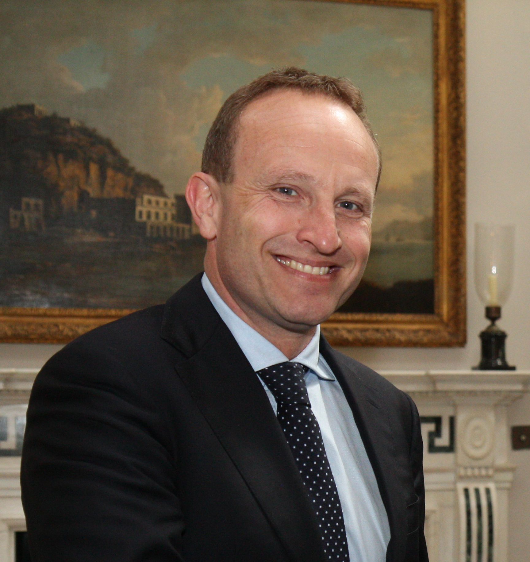 Martin Lidegaard, 2014.